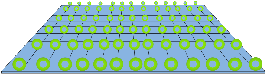 Des dimensions enroulées en tores, dans le contexte de la théorie de Kaluza-Klein